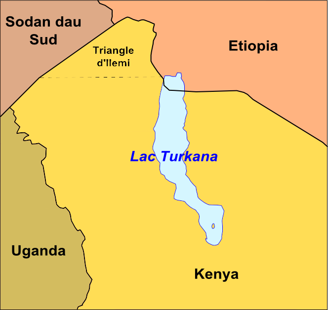 Lac Turkana